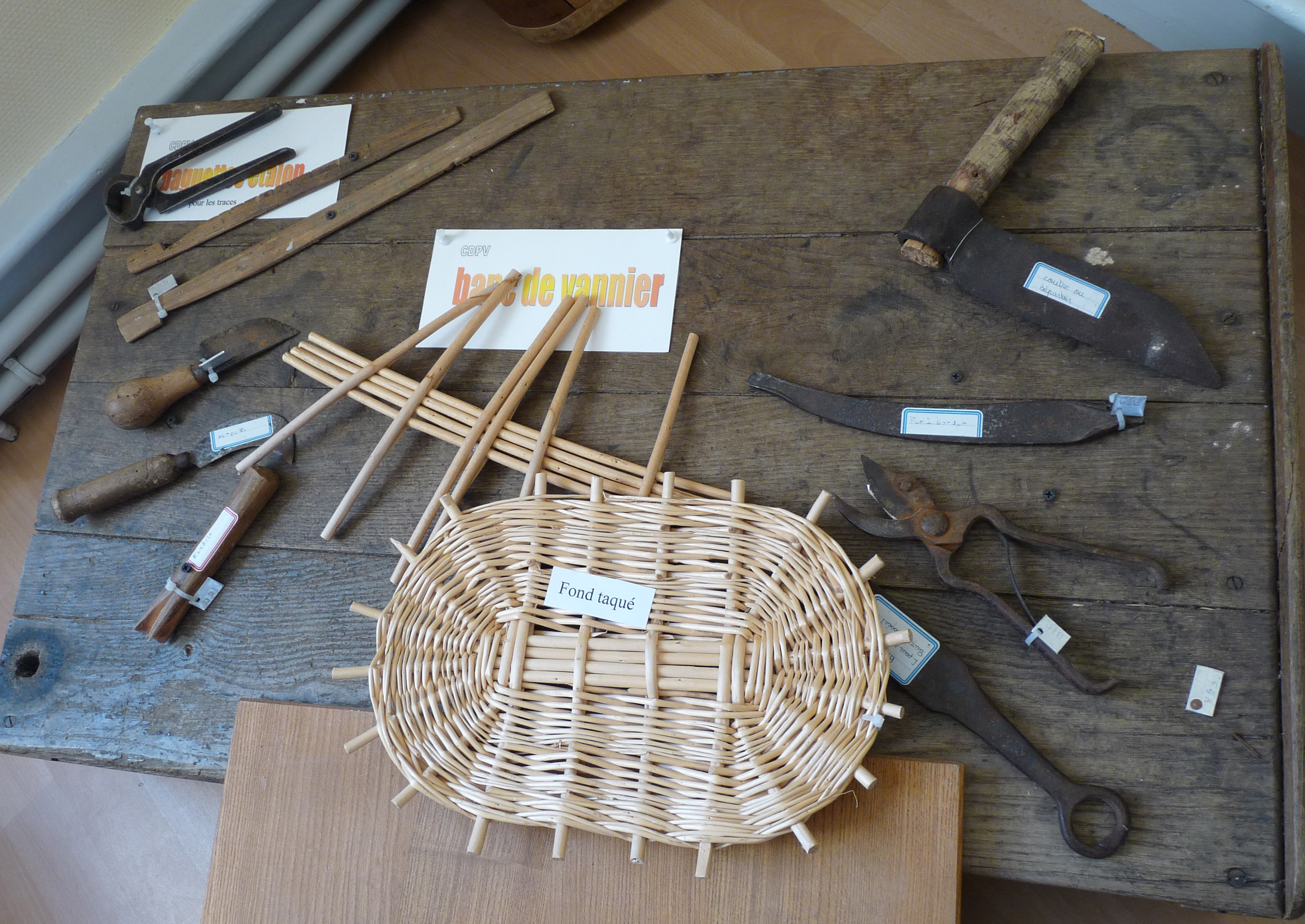 Banc et outils de vannier à la Maison de la Vannerie (Fayl-Billot, Haute-Marne)